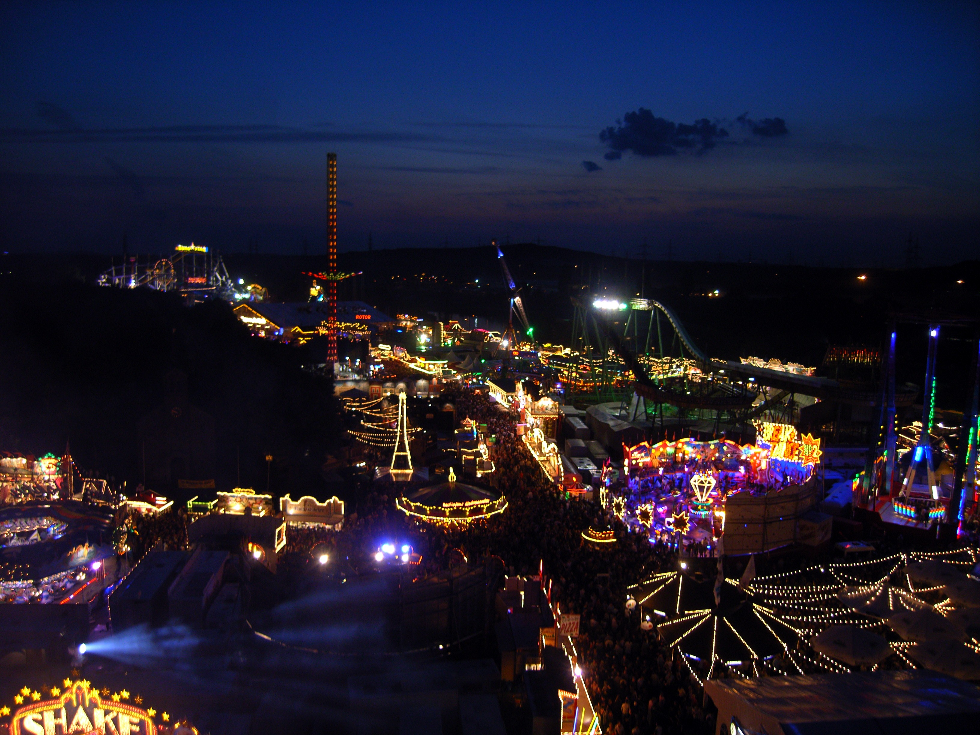 Cranger Kirmes 2007, Blick vom Riesenrad